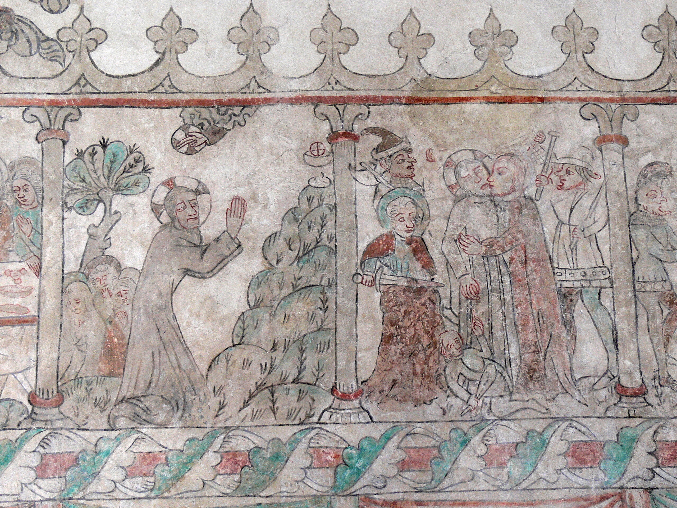 Öja Kyrka auf Gotland. Passionszyklus: Jesus in Gethsamene und Judaskuss